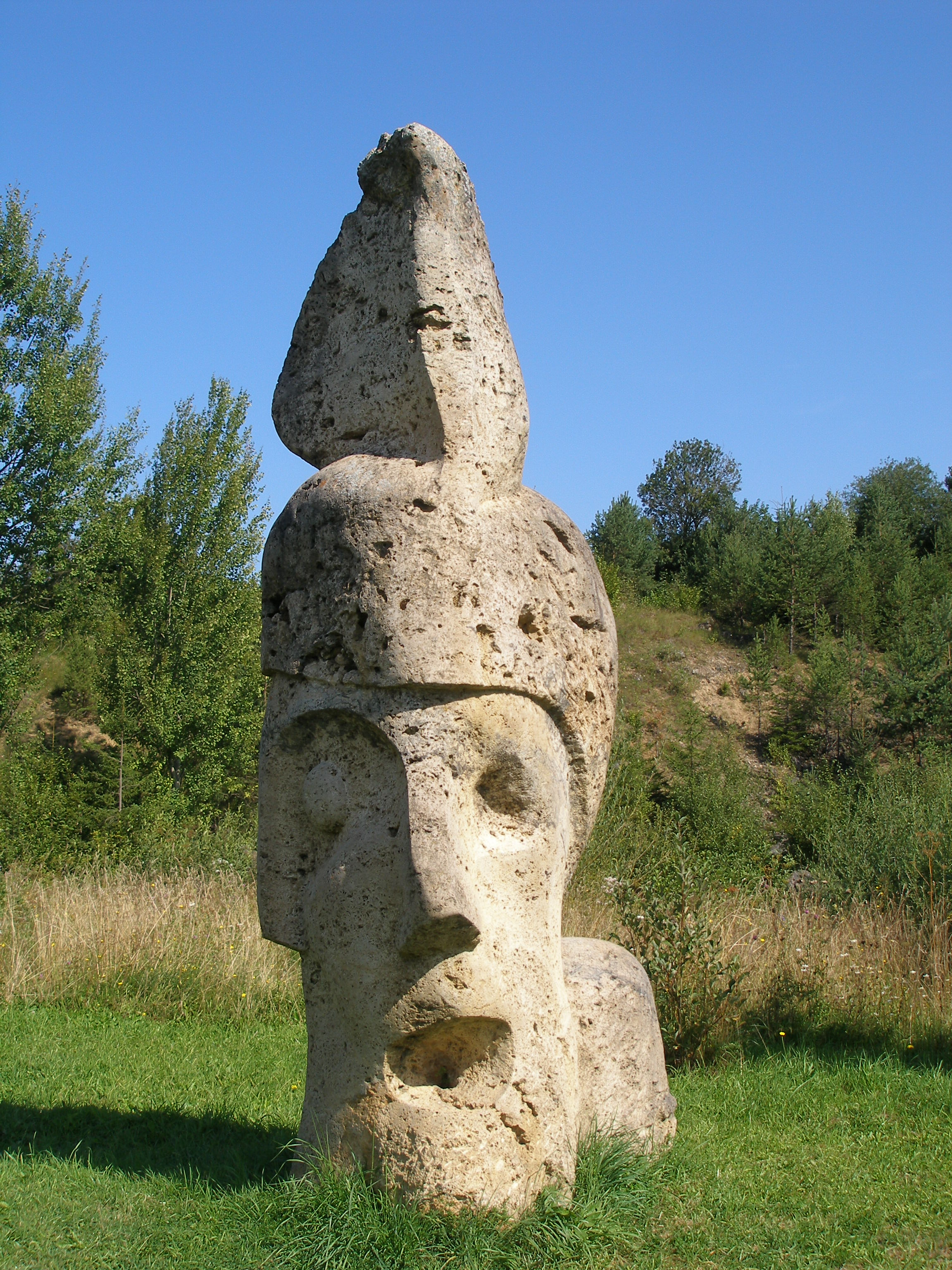 Sochy v Prírode. Kameňolom Vyšné Ružbachy. Okres Stará Ľubovňa.